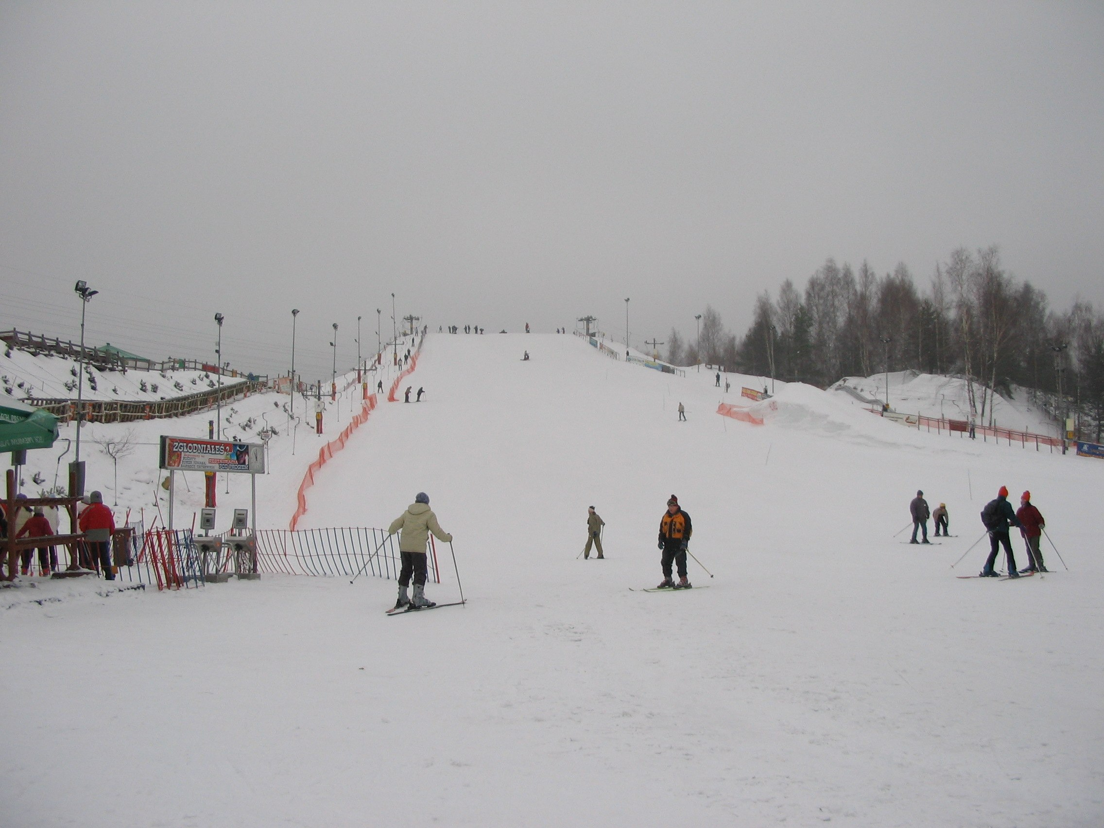 Dolomity Sportowa Dolina w Bytomiu